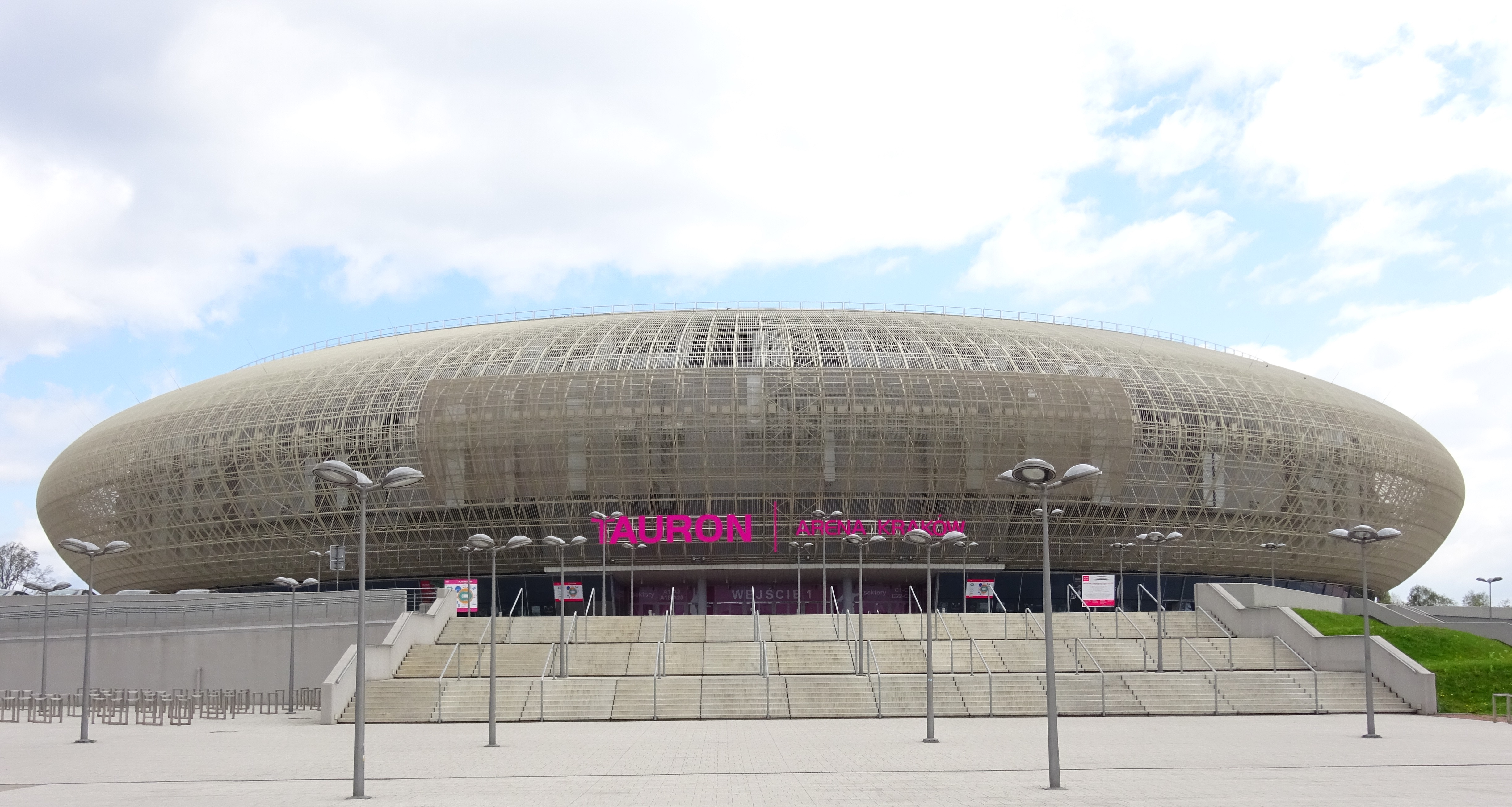 Kraków Arena. Wejście główne od strony ulicy Stanisława Lema. Kraków, 2016.